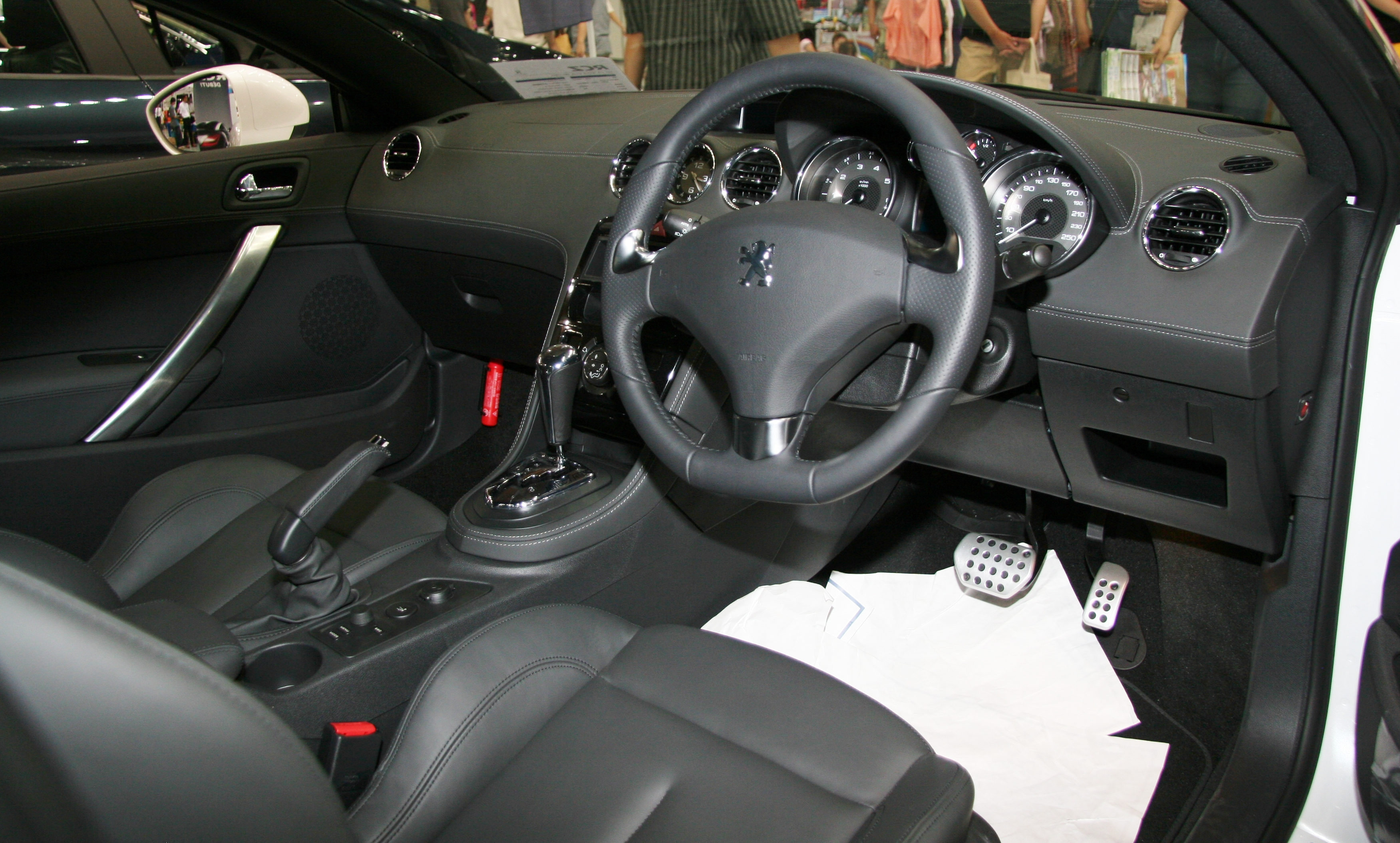 Peugeot RCZ